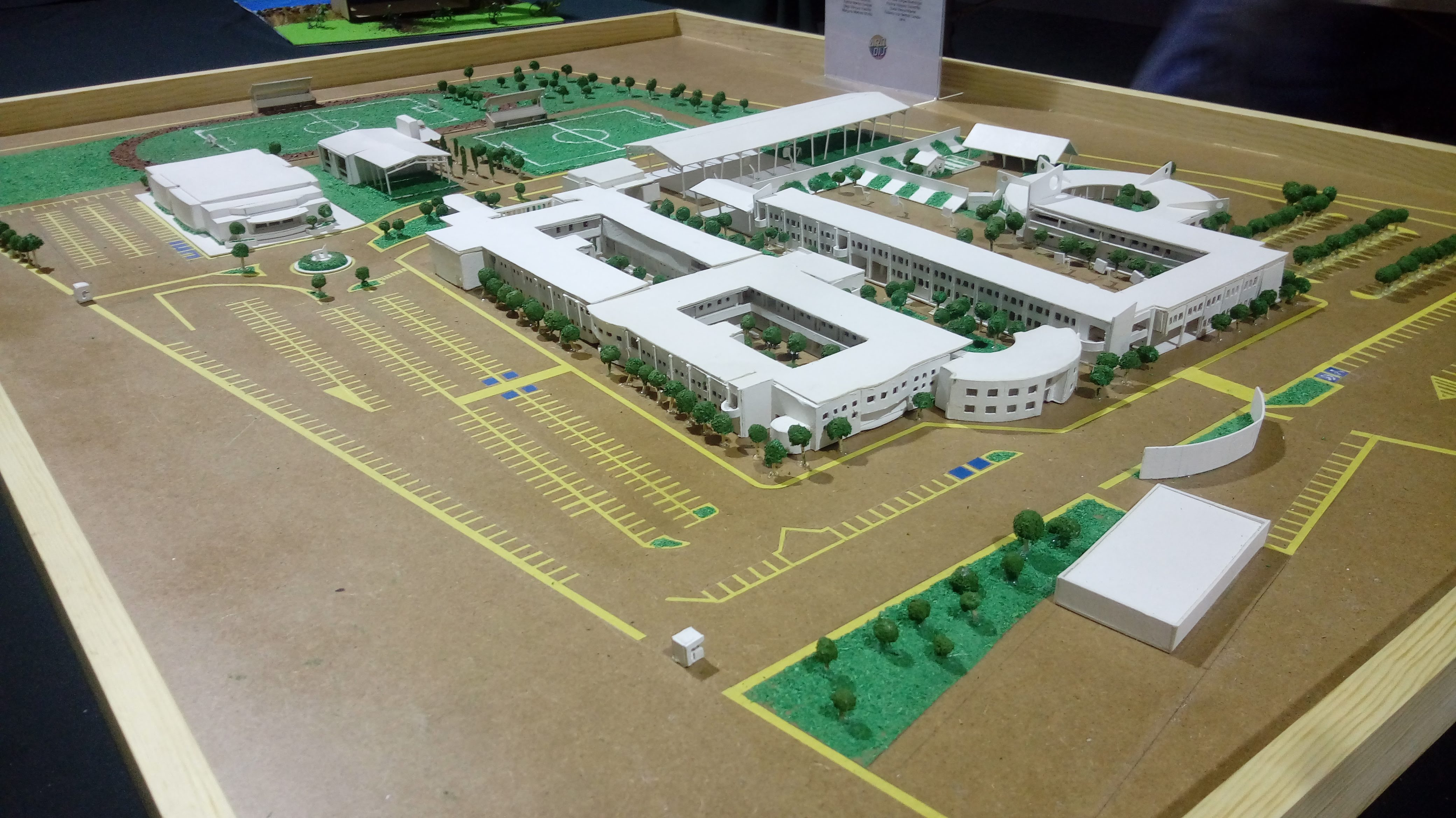 Maqueta de la Escuela Carlos Pereyra realizada por alumnos de la generación 2018-2019 del área de Arquitectura y Diseño